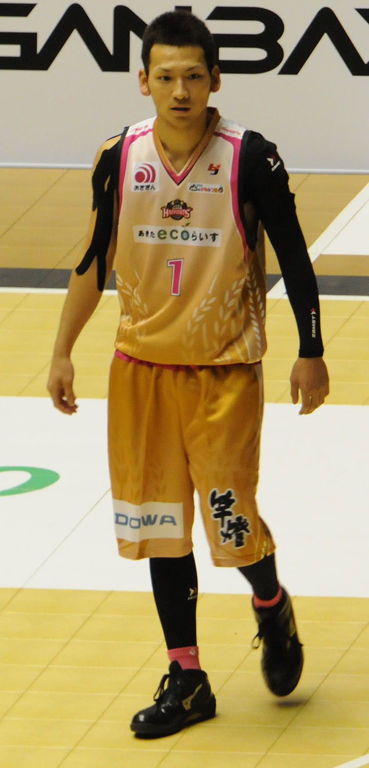 秋田ノーザンハピネッツ、澤口誠選手。秋田県立体育館で。